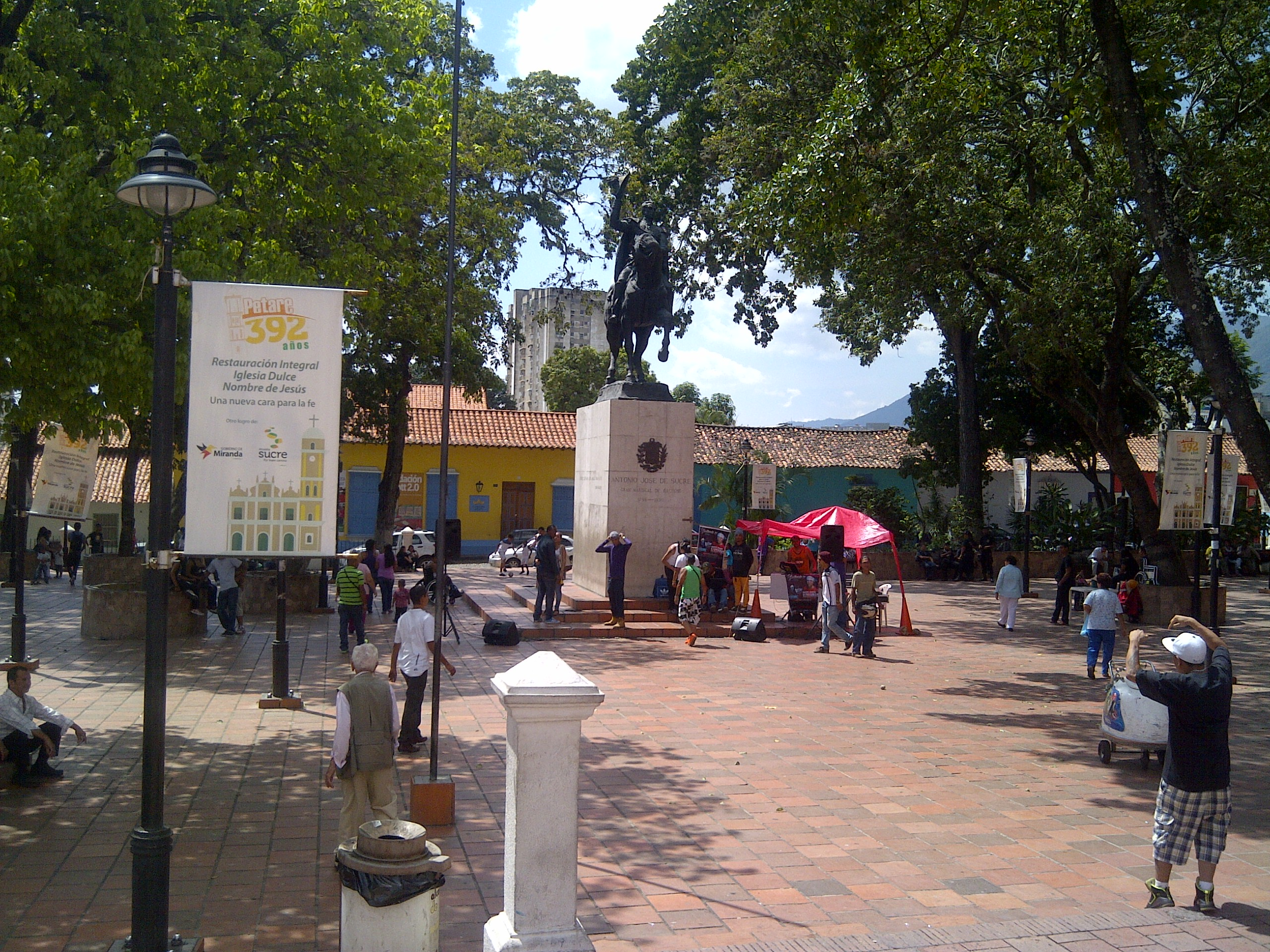 Plaza Sucre de Petare. Casco Histórico de Petare.